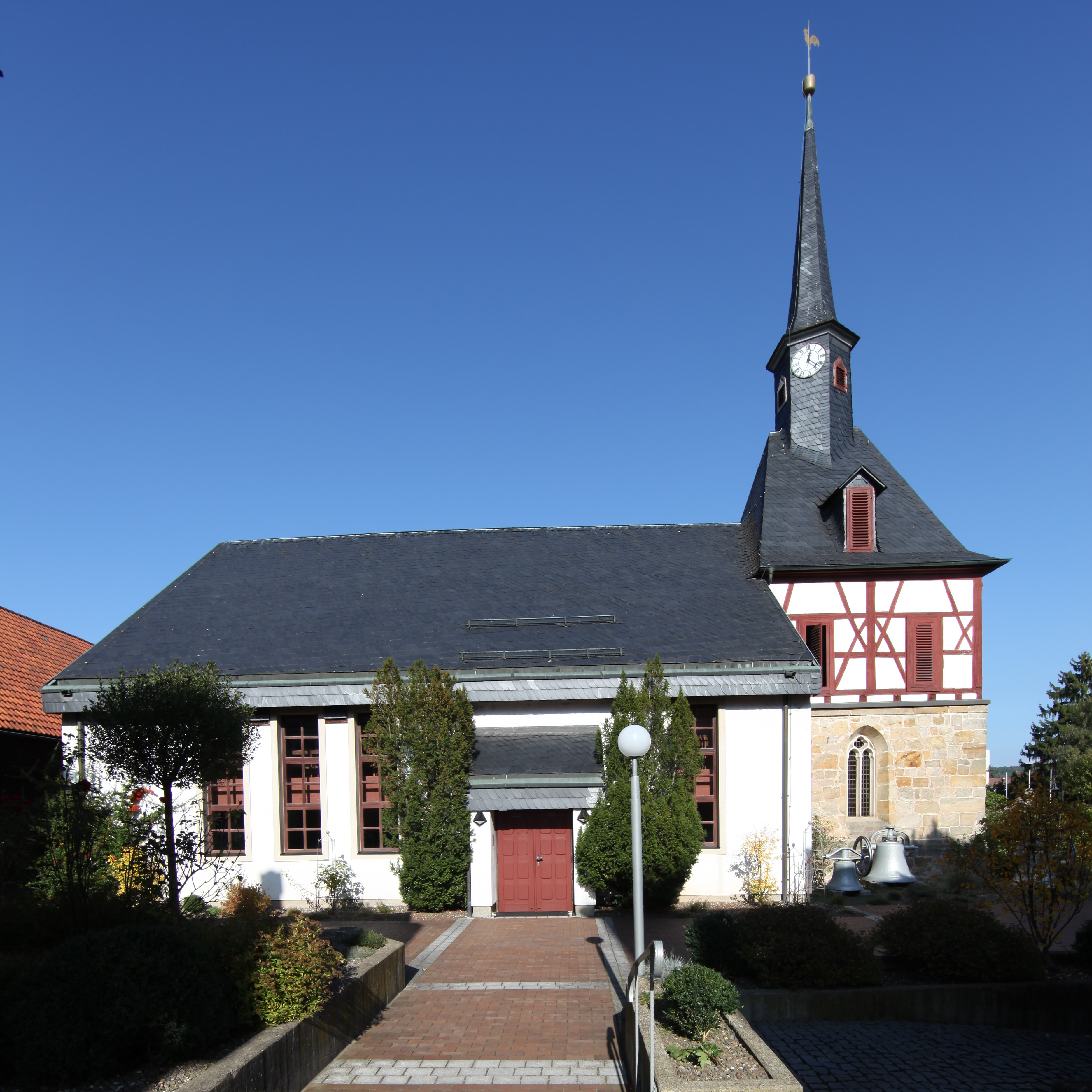 Evangelisch-Lutherische Pfarrkirche Weidhausen bei Coburg